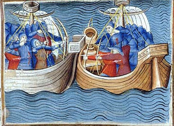 Bitva u Guernsey 1342